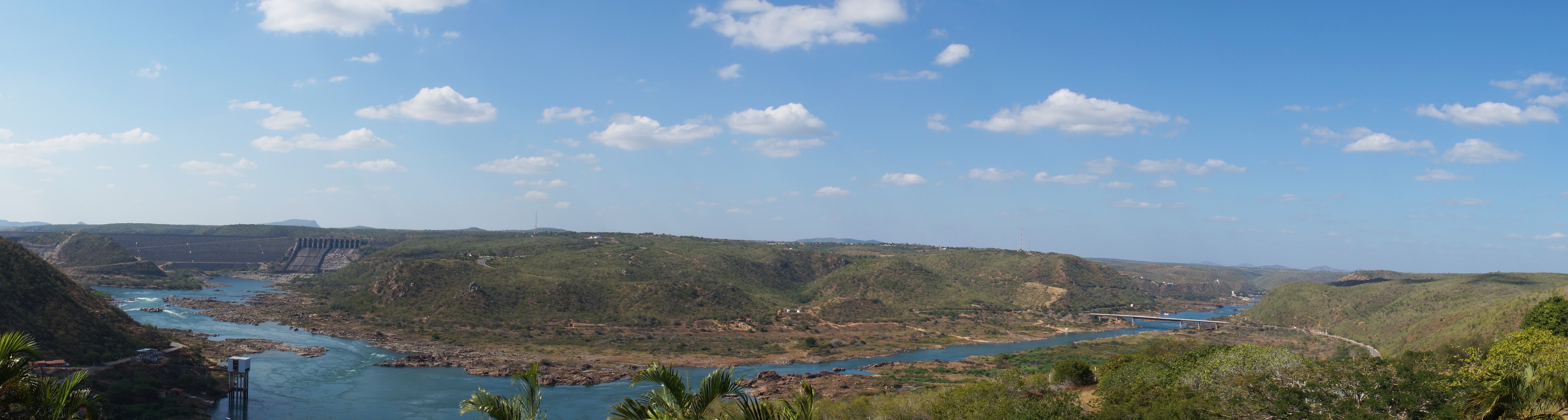 Xingó